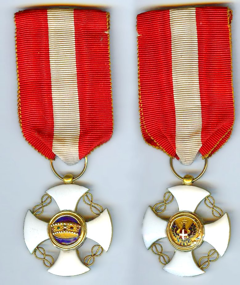 Croce da Cavaliere dell'Ordine della Corona d'Italia. Sono il proprietario della croce